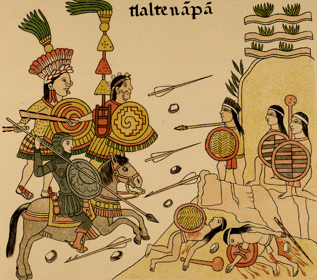 Conquista del señorio caxcán de Tlaltenango por los españoles y Tlaxcaltecas.